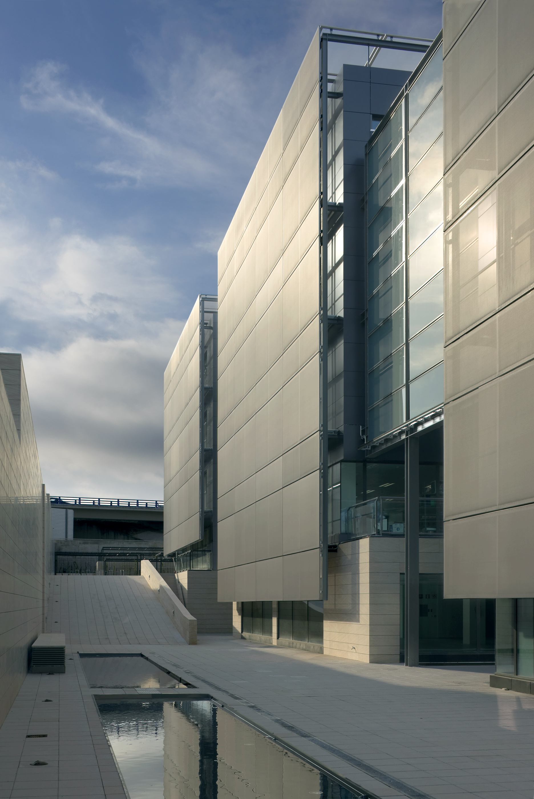 Allende Arquitectos